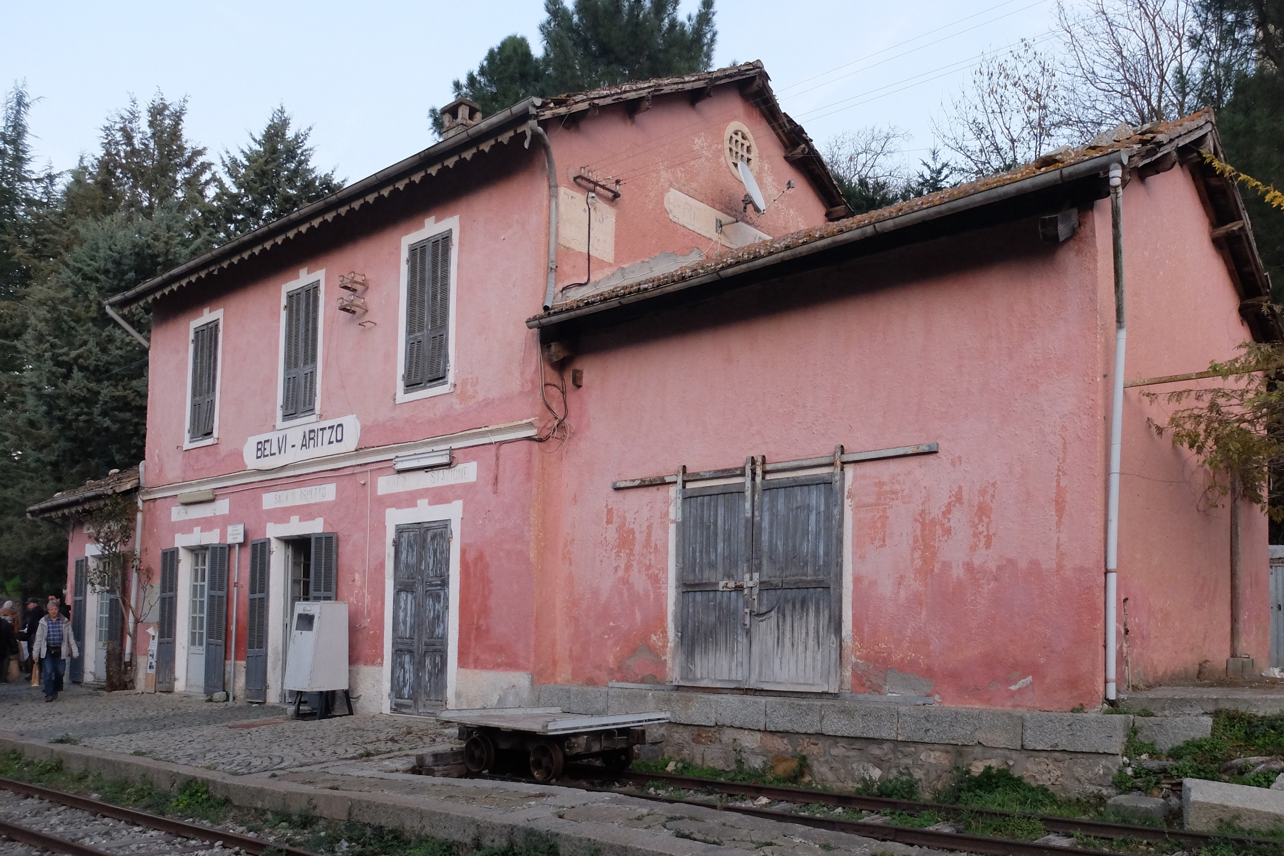 Bahnhof Belvi-Aritzo an der Strecke Isili–Sorgono